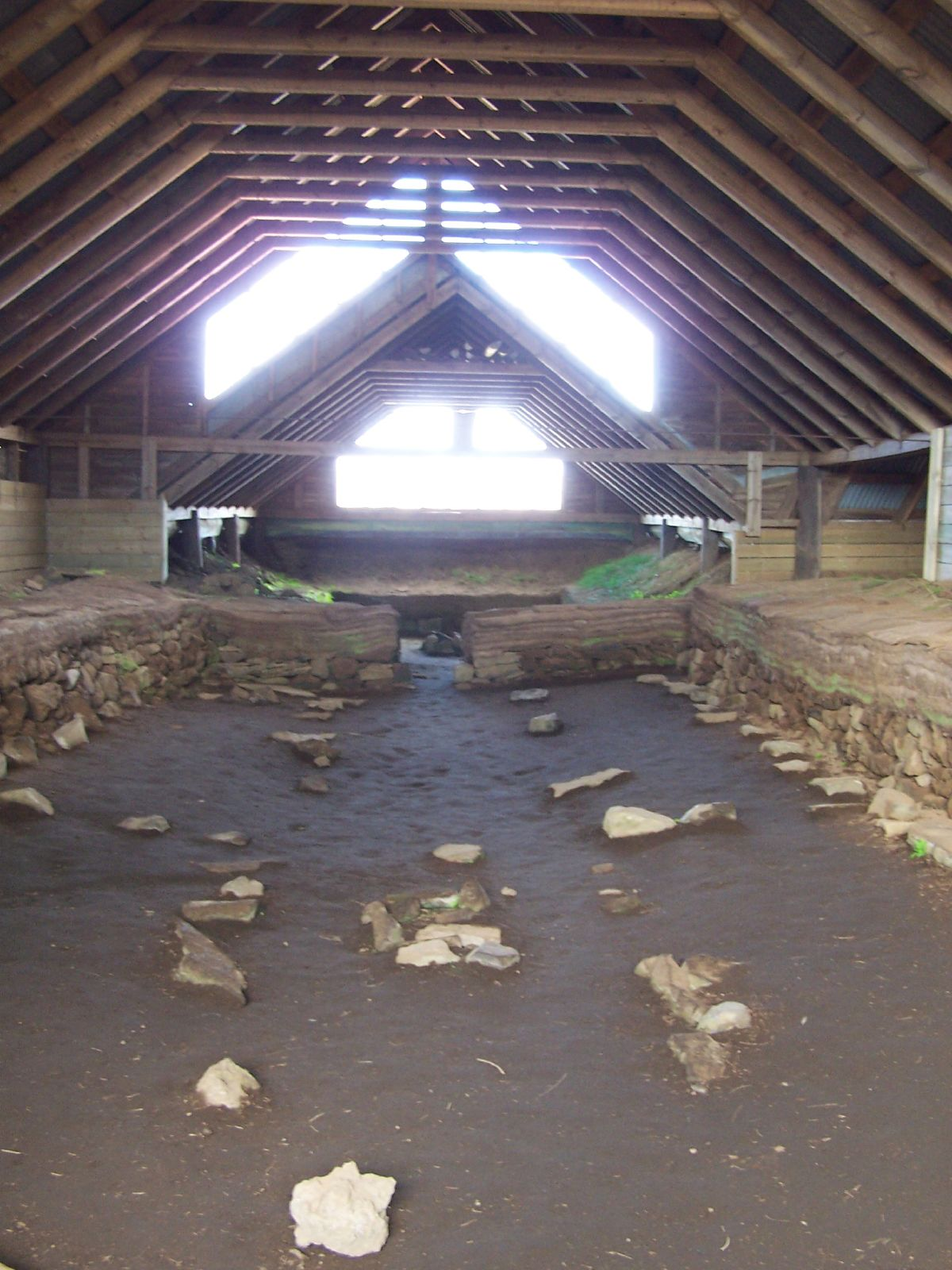 Stöng, interior